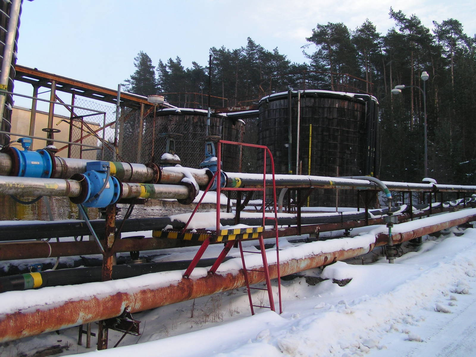 Uranový důl u Stráže pod Ralskem, okres Česká Lípa, Czech Republic Jiří Vackář 20:47, 15 May 2006 (UTC)